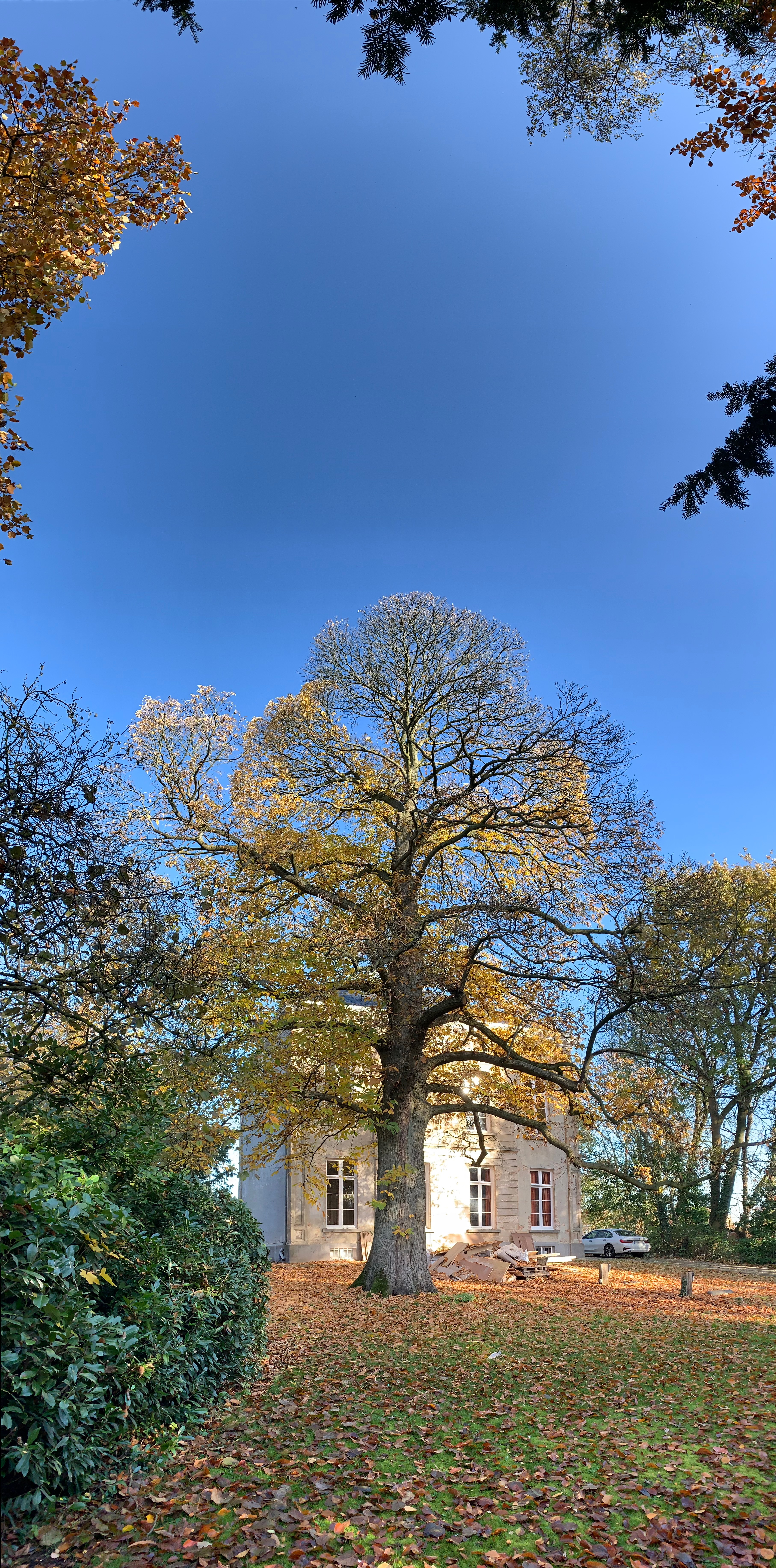 De tamme kastanjeboom in de voortuin van het Kasteel. Aanvankelijk was deze niet aanwezig. De foto dateert van 22 november 2019, toen verbouwingswerken nog steeds bezig waren.